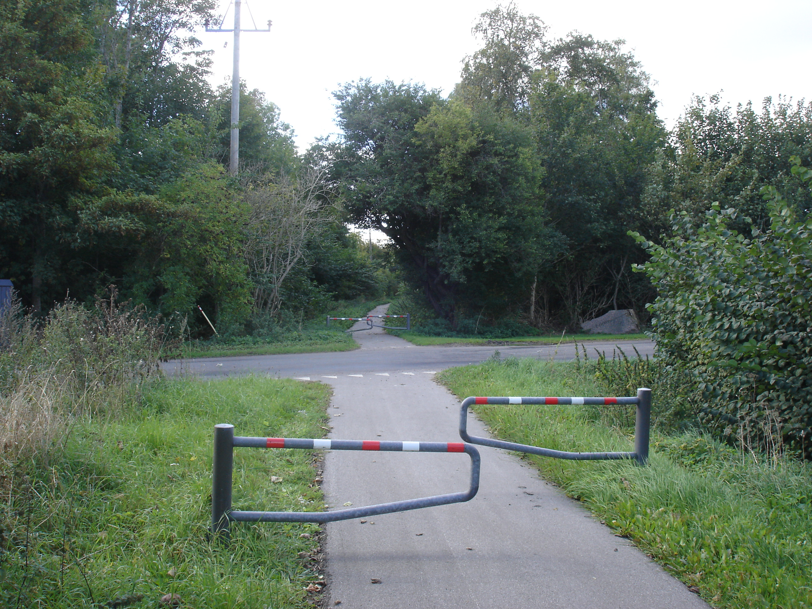 Stien på Aalborg-Hadsund-banens tracé krydser Louisendalvej, hvor Louisendal trinbræt lå